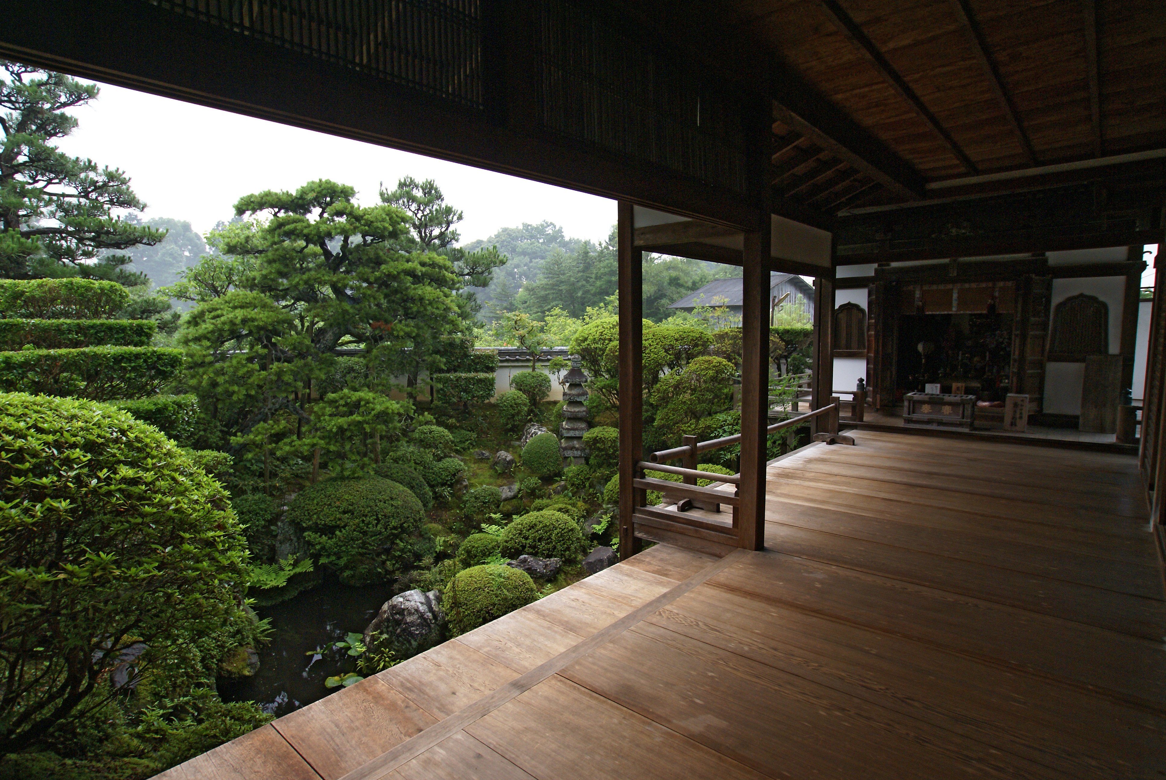 Chogaku-ji in Tenri, Nara, Japan